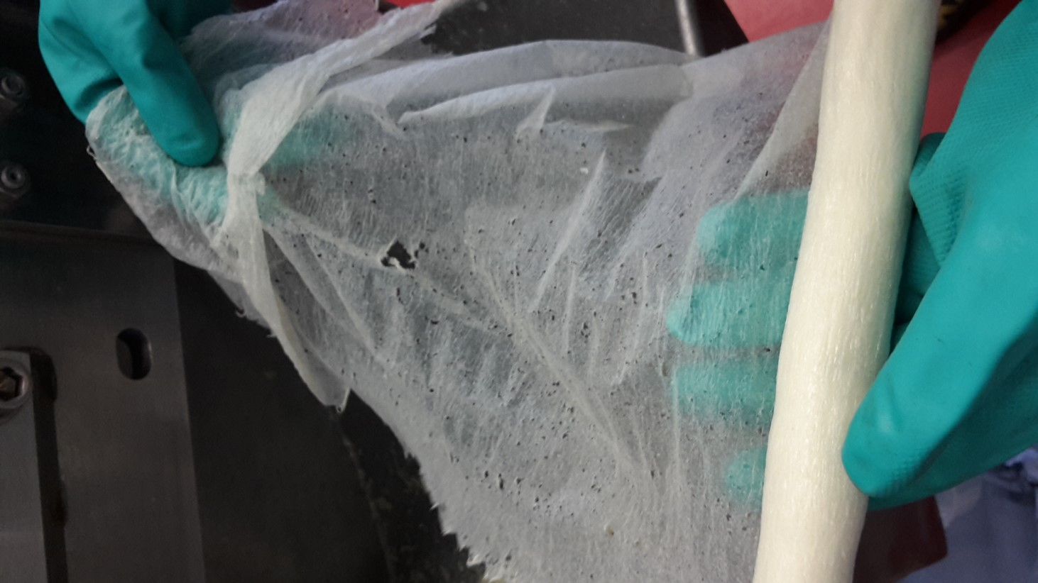 Aus dem Sammelbehälter des Vakuum-Walzentrockners entnommener Feststoff. Die sogenannte "Zigarre" besteht aus dem, am Messerbalken, aufgerollten Produktfilm.